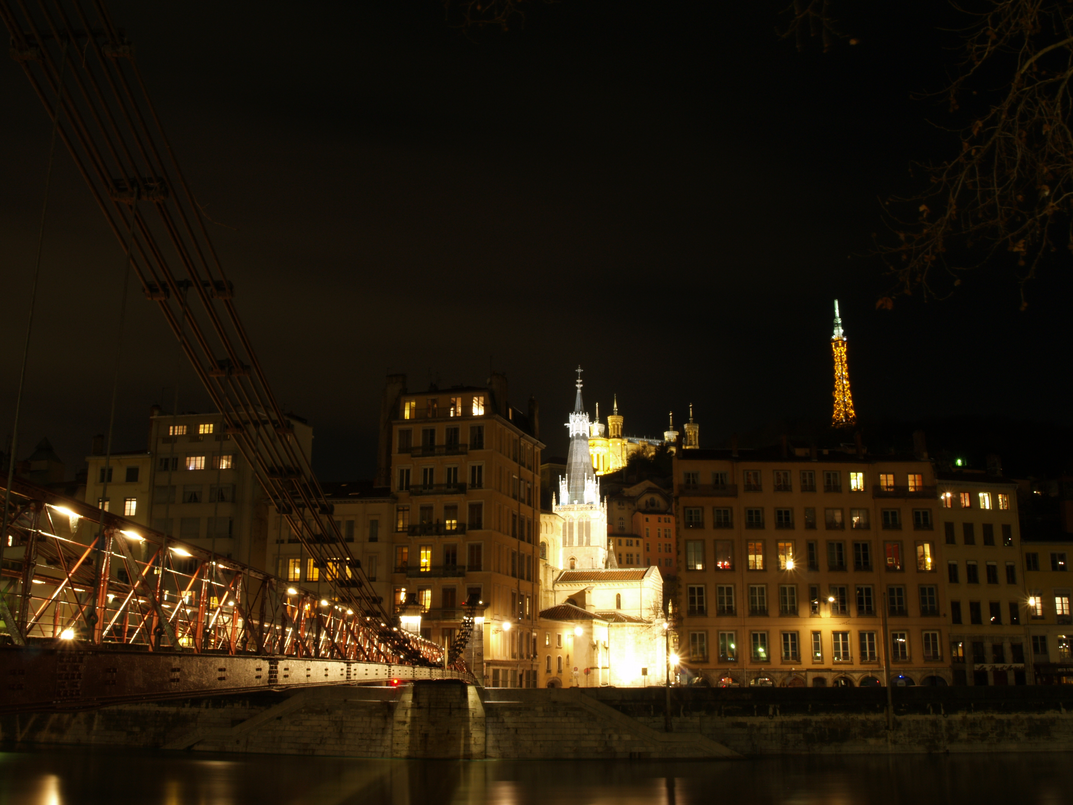 Alignement de Passerelle Saint-Vincent, Église Saint-Paul, Basilique Notre-Dame de Fourvière. Prise longue exposition de nuit.